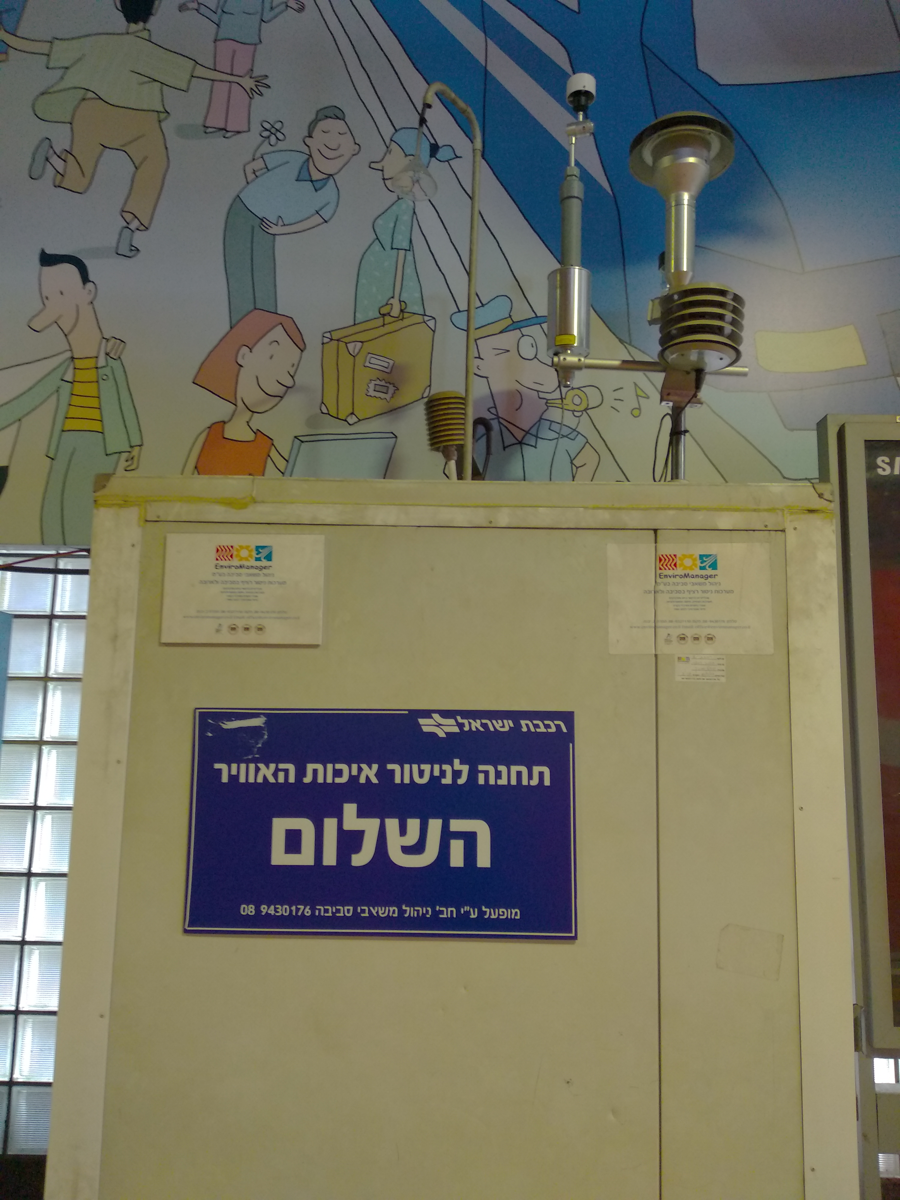 תחנה לניטור איכות האוויר, בתחנת הרכבת תל אביב - השלום